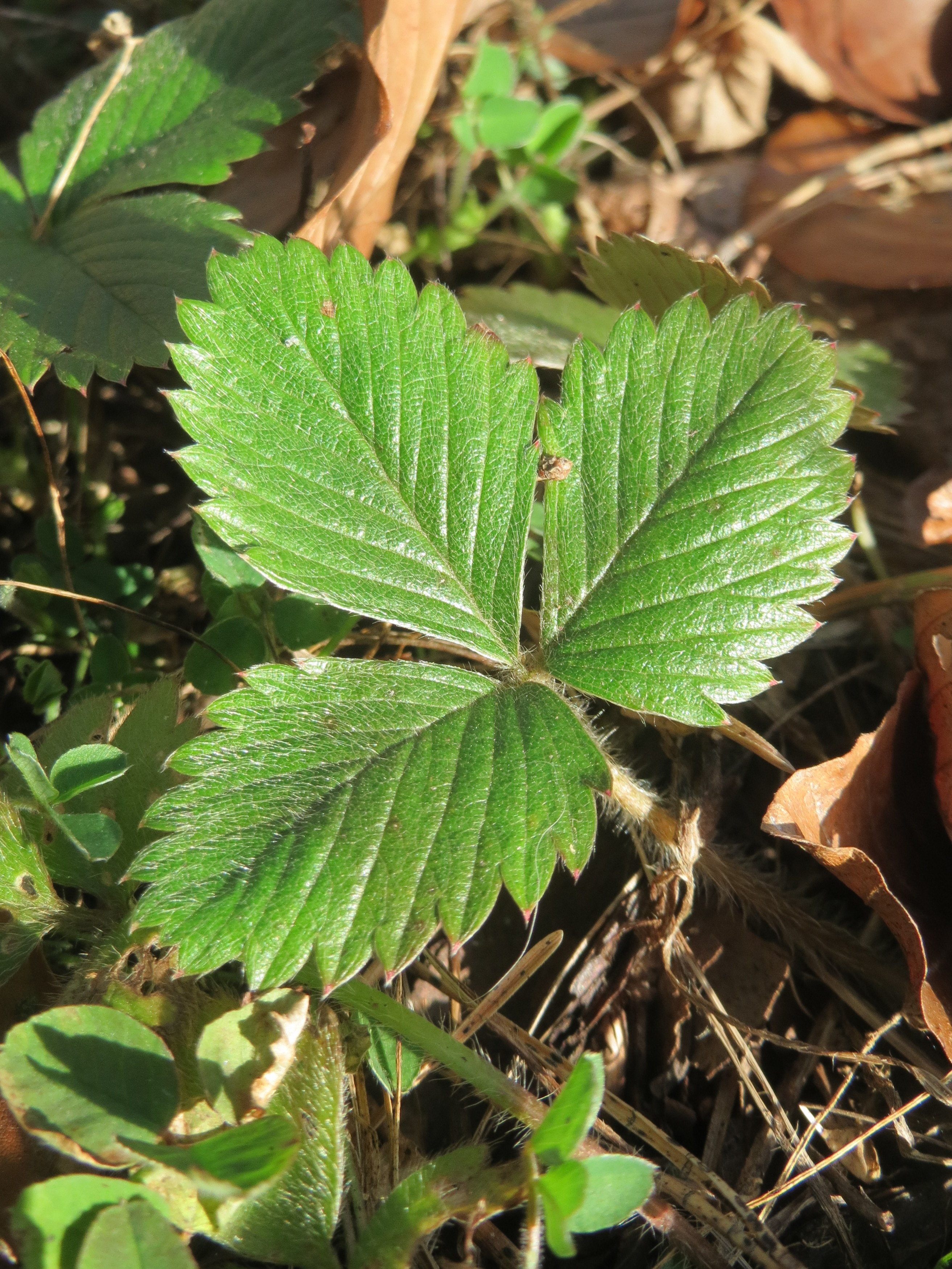 Grundblätter der Wald-Erdbeere (Fragaria vesca) in der Schwetzinger Hardt